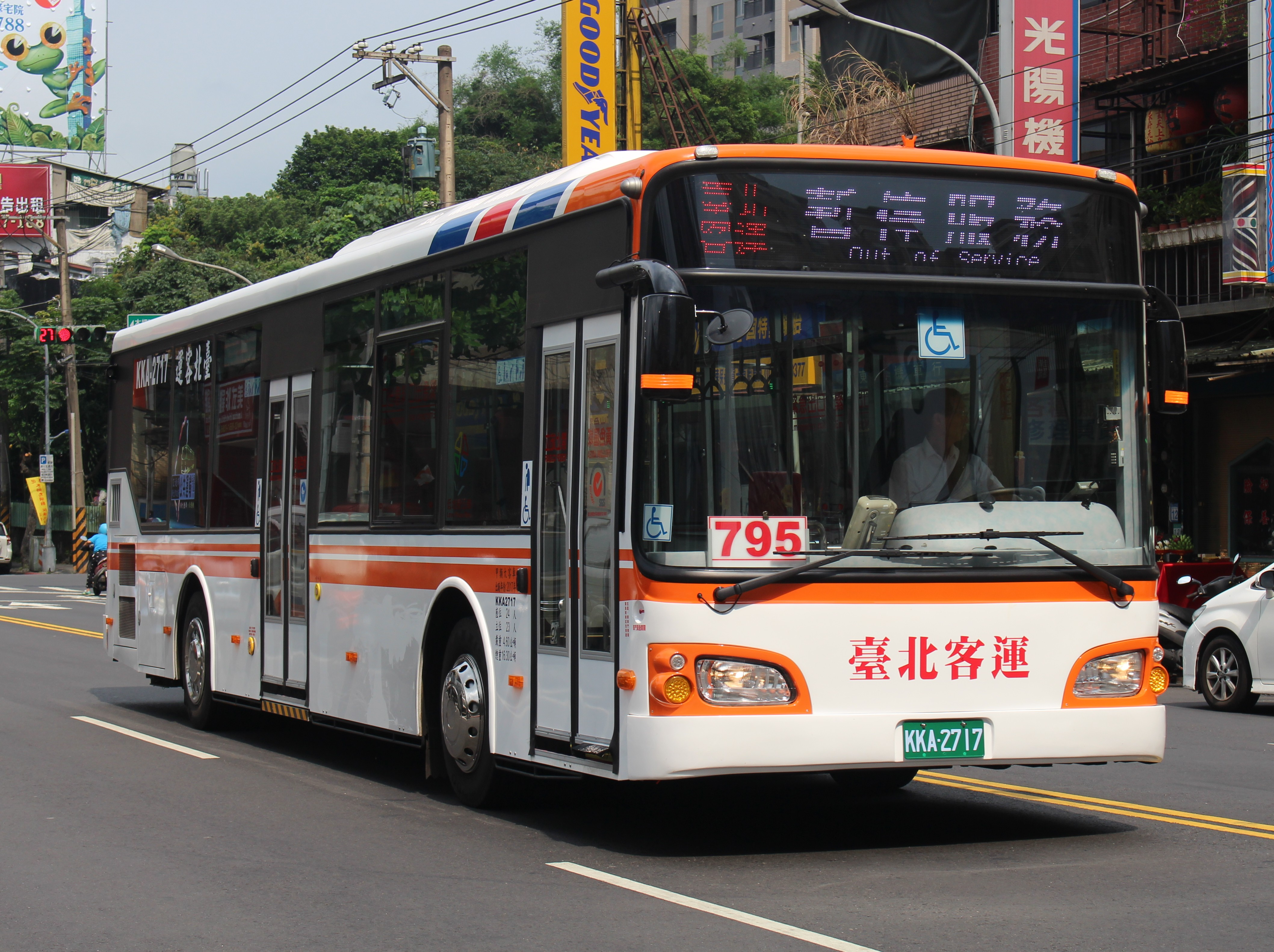 中文（台灣）: 臺北客運2018年日野HS8JRVL-UTF大客車KKA-2717行駛新北市區公車795路線，暫停服務。